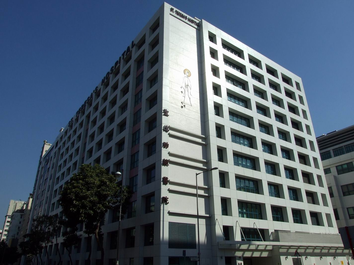 聖德勒撒醫院